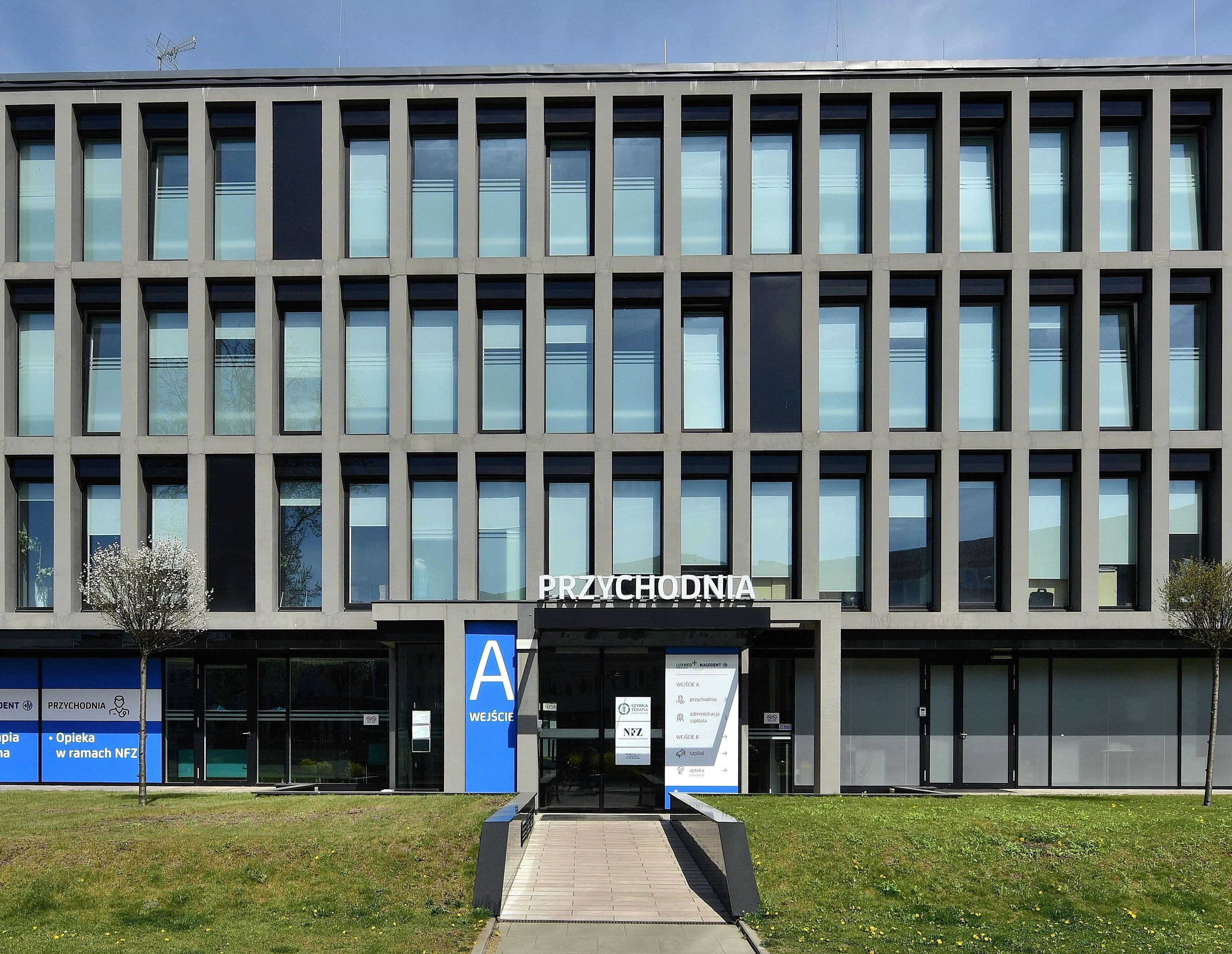 Przychodnia lekarska przy ul. Szamockiej 6 w Warszawie